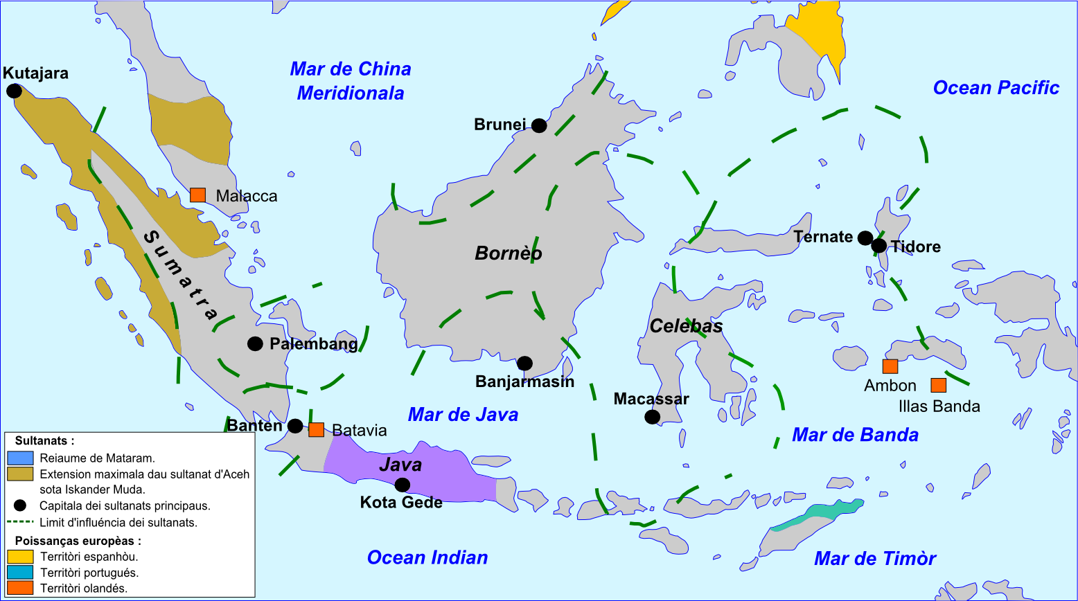 Sultanats indonesians dins leis annadas 1640.